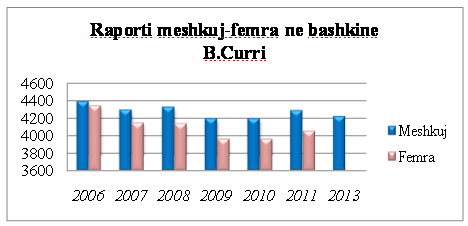 Raporti i meshkuj -femrave